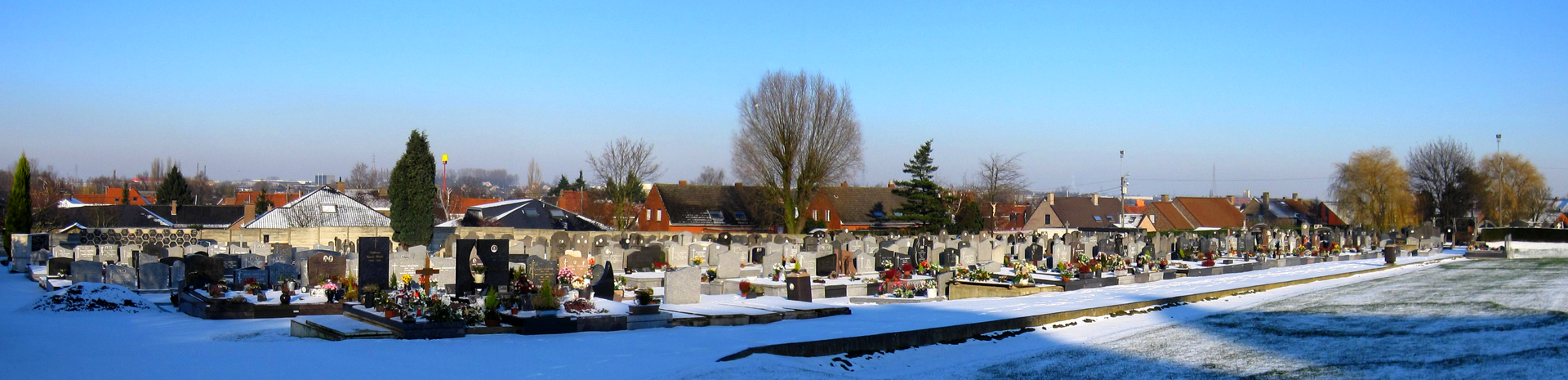 Le cimetière de Luingne en 2009.